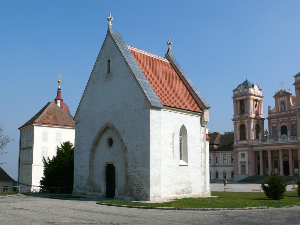 Erentrudiskapelle